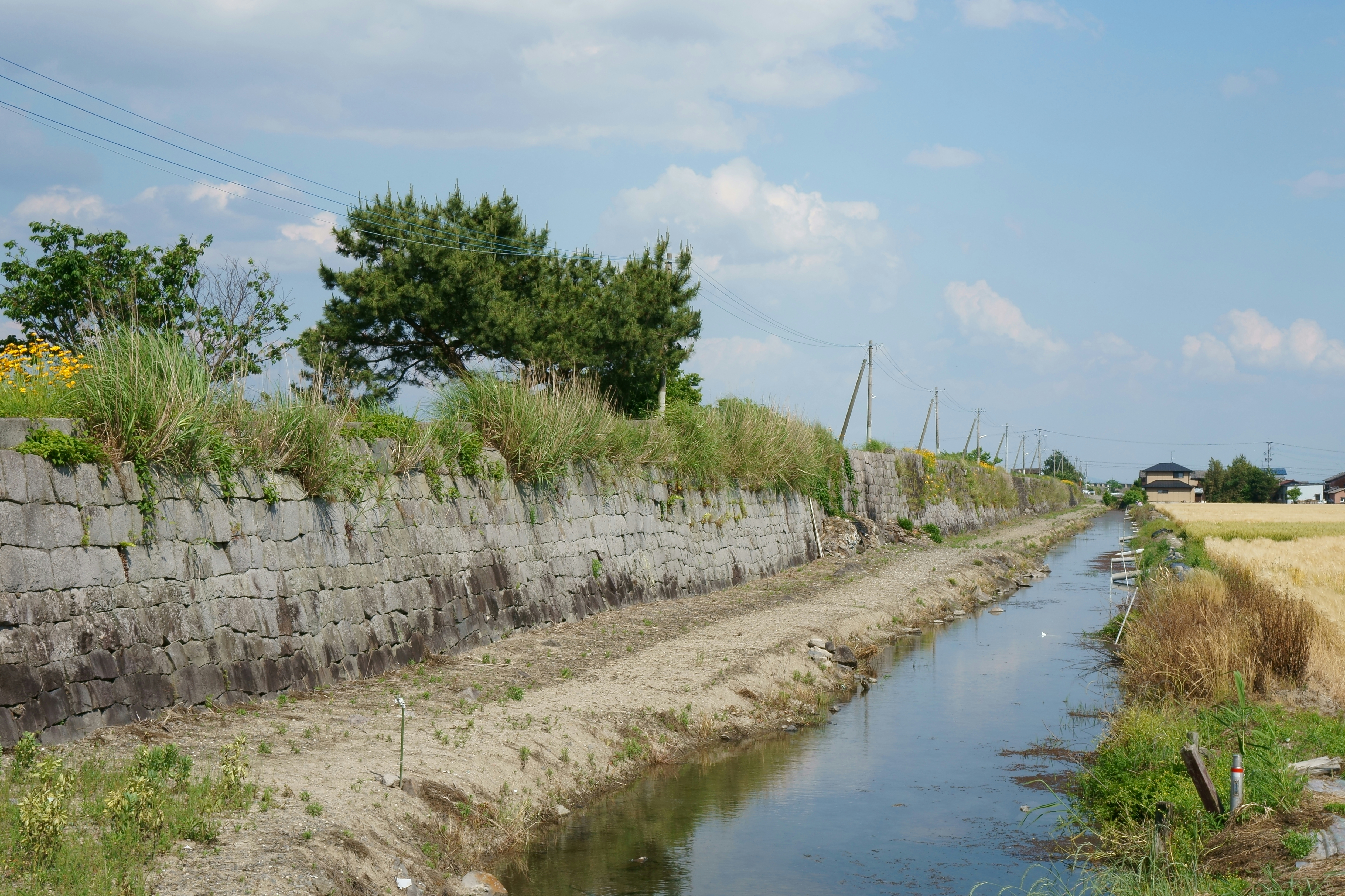 授産社搦（じゅさんしゃからみ）の石積み干拓堤防跡。佐賀県佐賀市東与賀町大字下古賀。明治中期竣工で、西隣の大搦堤防とともに「東与賀地区大搦堤防・授産社搦堤防」として土木学会選奨土木遺産に認定、また2012年に第12回佐賀市景観賞に選定されている。奥が堤防と同時に造られた授産社搦の干拓地で、手前はその後大正15年から昭和初期にかけて造られた大授搦の干拓地。